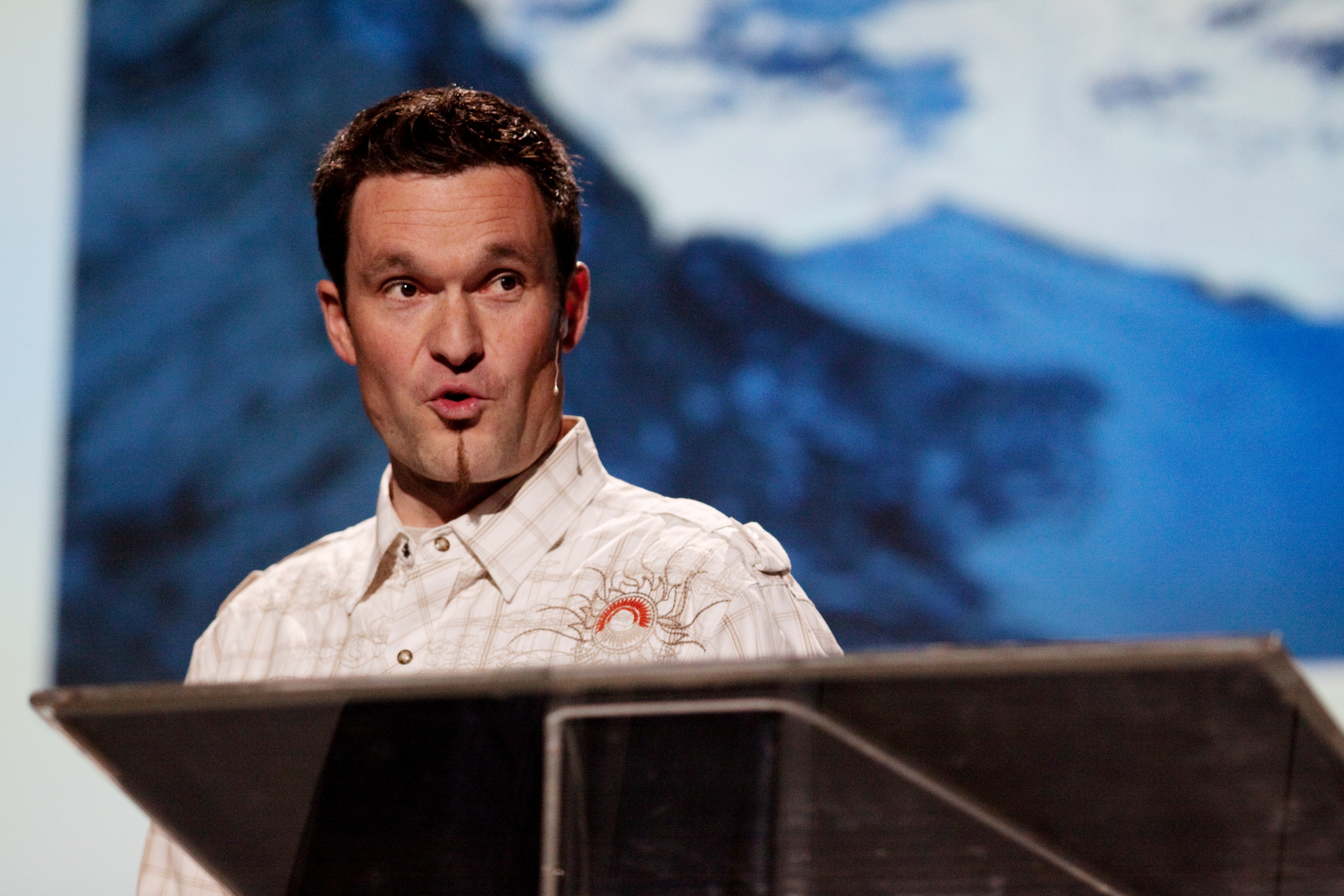 Swiss BASE jumper Ueli Gegenschatz